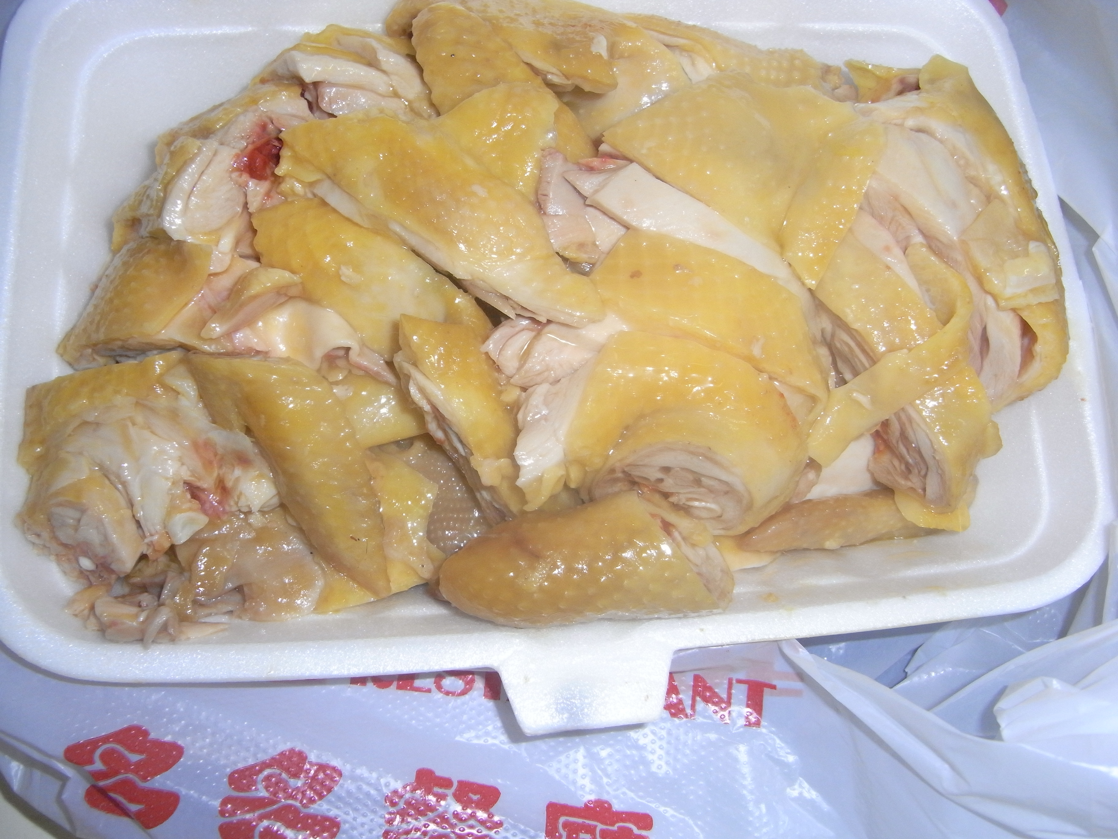 中文（香港）: 多多餐廳燒腊飯店